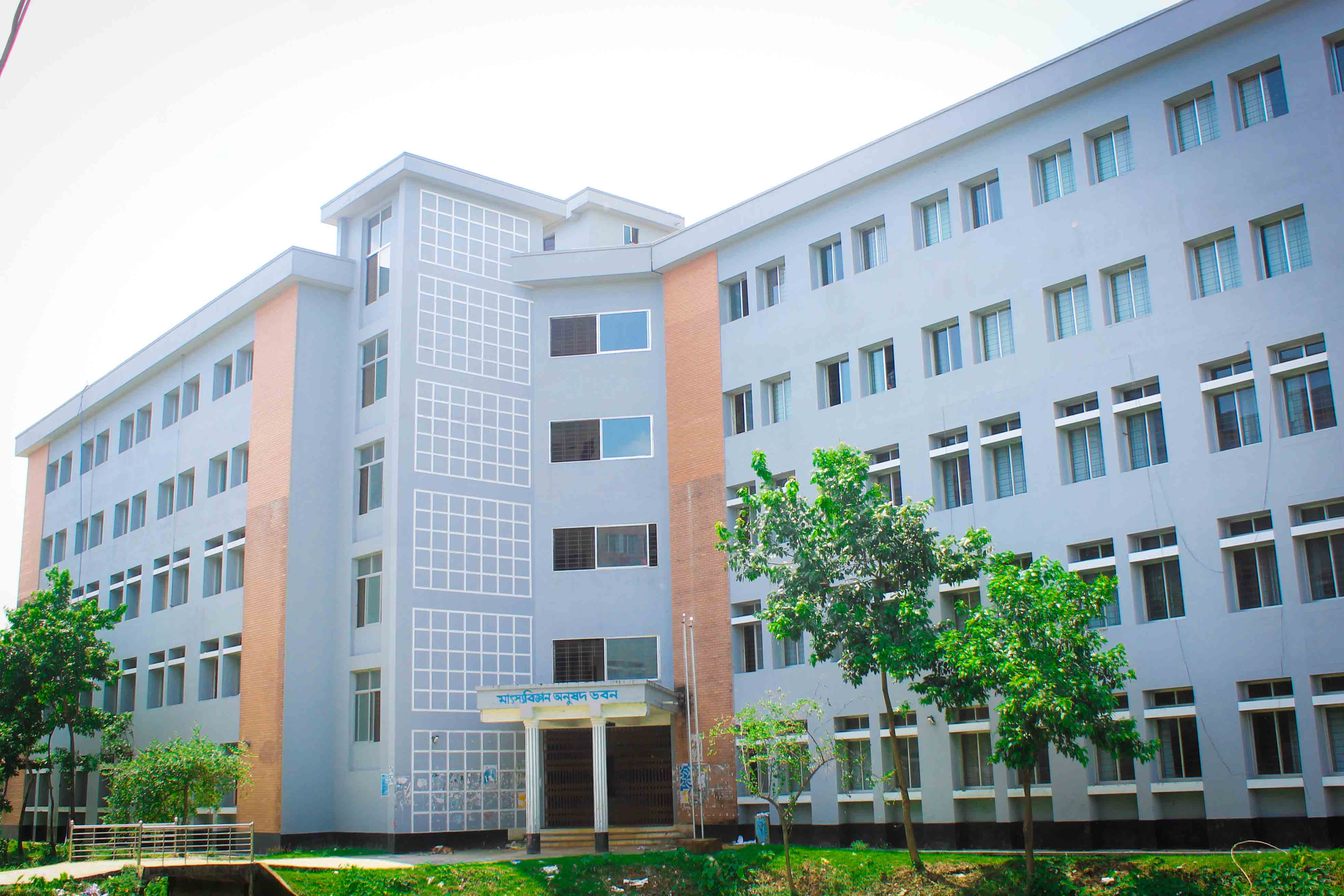 মাৎস্যবিজ্ঞান অনুষদীয় ভবন, সিলেট কৃষি বিশ্ববিদ্যালয়।